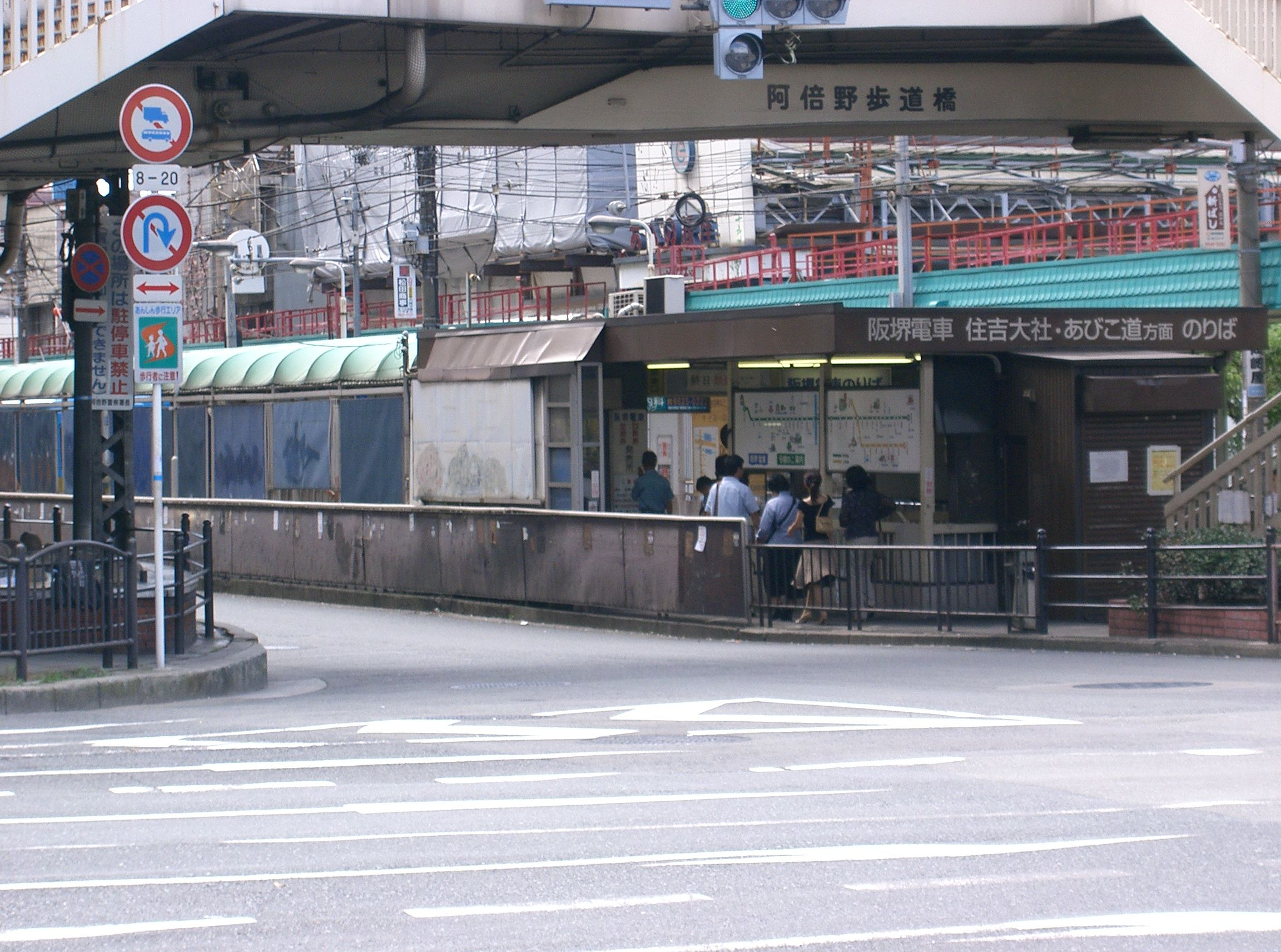 阪堺電気軌道 天王寺駅前駅